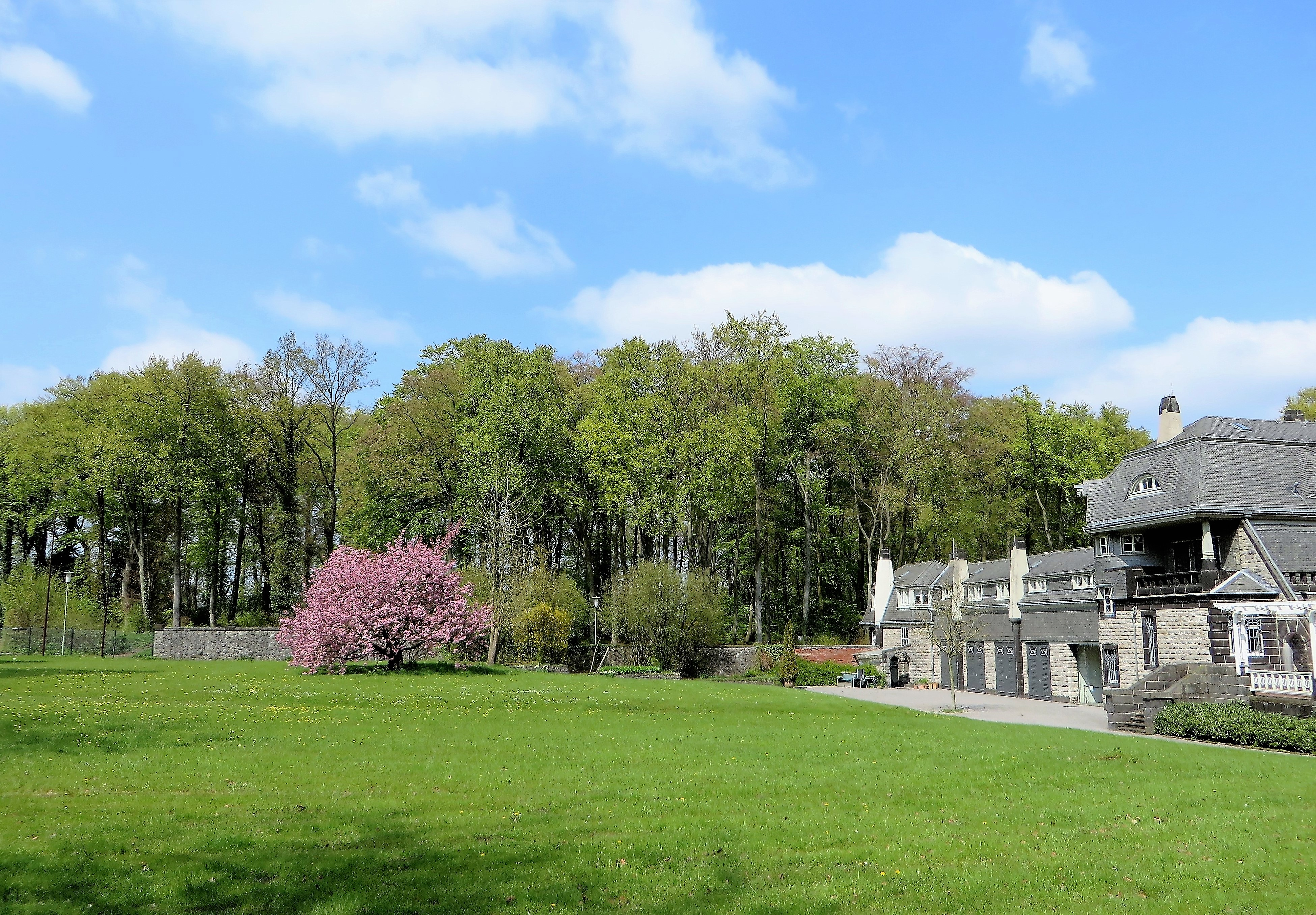 Landschaftsschutzgebiet „Emst, westlich der A 45“ in der Hagener Gartenstadt Hohenhagen. Es handelt sich um Laubwaldkomplexe, z.T. mit Althölzern. Blick über den Garten (Foto) der denkmalgeschützten Jugendstilvilla Hohenhof am Stirnband auf den im Hintergrund geschützten Teil des Waldes. Bei dem angrenzenden schmalen geschützten Landschaftsbestandteil „Hohenhof“ entlang der A 45, westlich des Hohenhofes, handelt es sich um einen Kalk-Buchenwald mit gut ausgebildeter Krautschicht sowie angrenzenden Brachfluren.